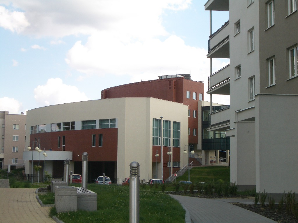 Siedziba Collegium Iuridicum Wyższaj Szkoły Prawa i Administracji w Rzeszowie